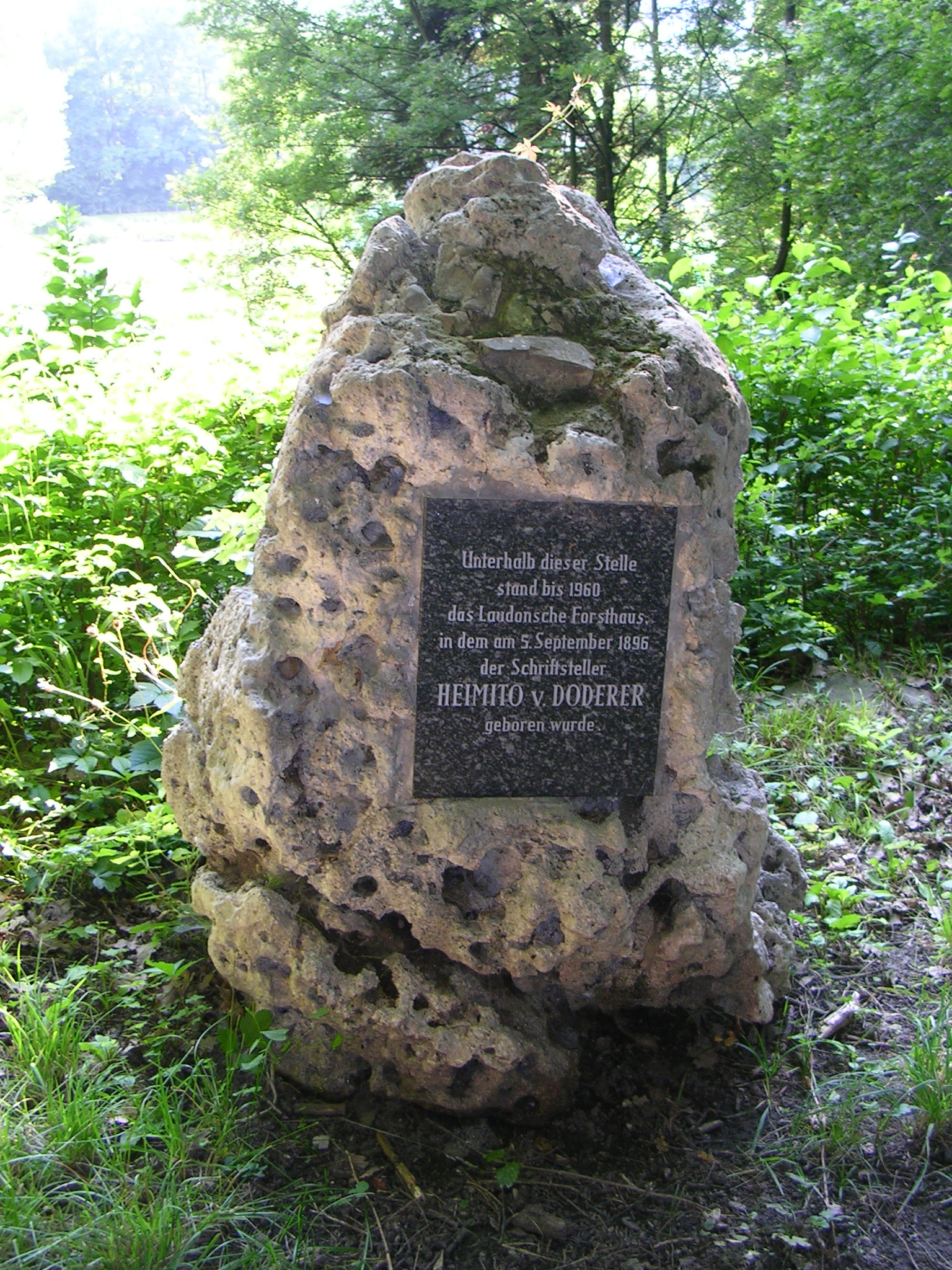 Gedenkstein am Platz des ehemaligen Geburtshauses von Heimito von Doderer